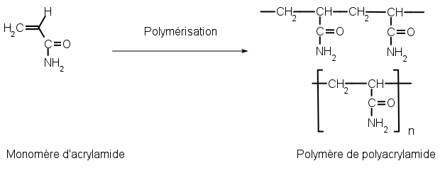 polymérisation de l'acrylamide